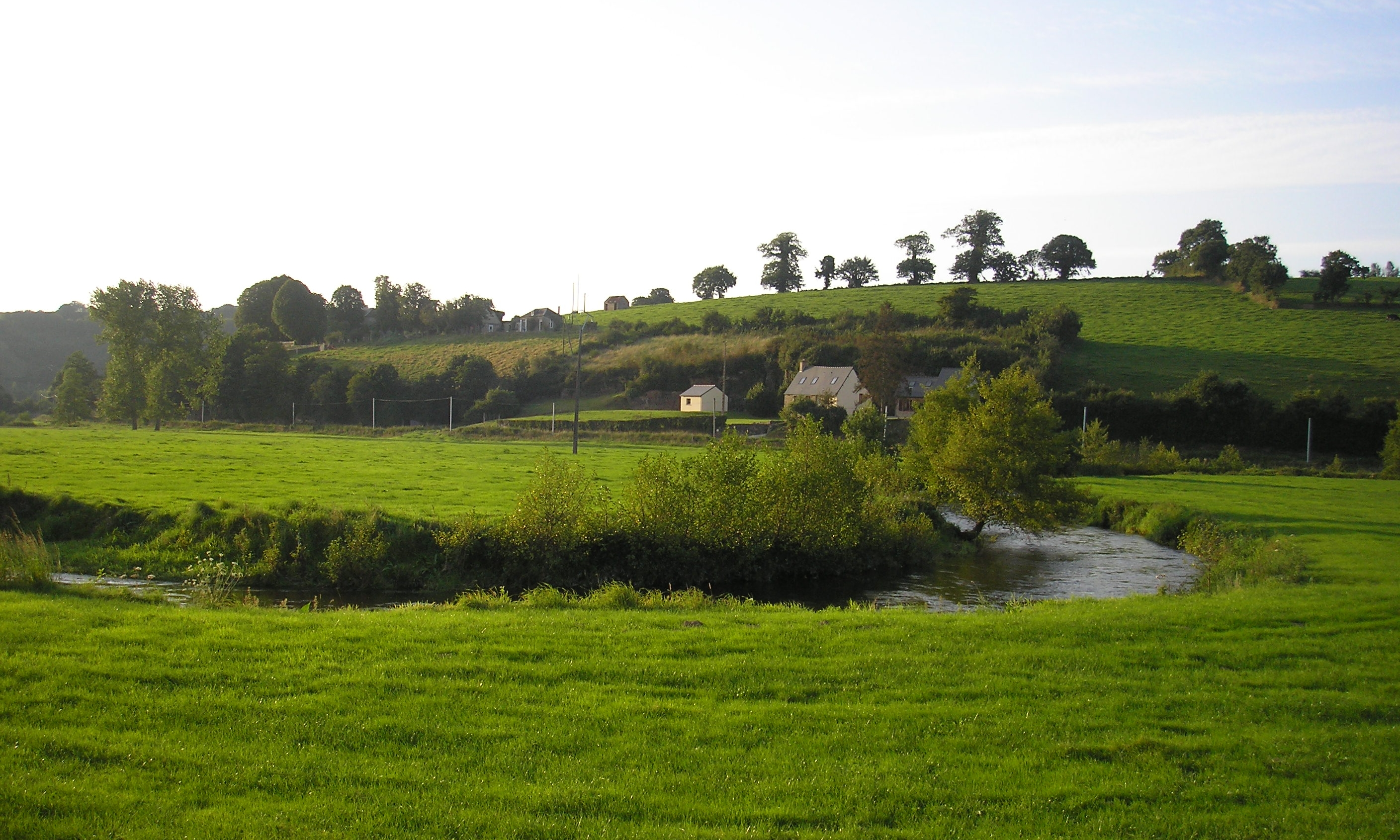 La Vire (Normandie, France) séparant les communes de Sainte-Marie-Outre-l'Eau et Pont-Farcy (ancienne commune de Pleines-Oeuvres).